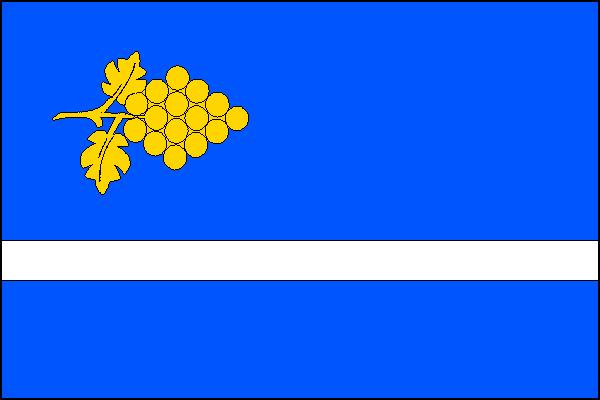 Vlajka obce Přibice